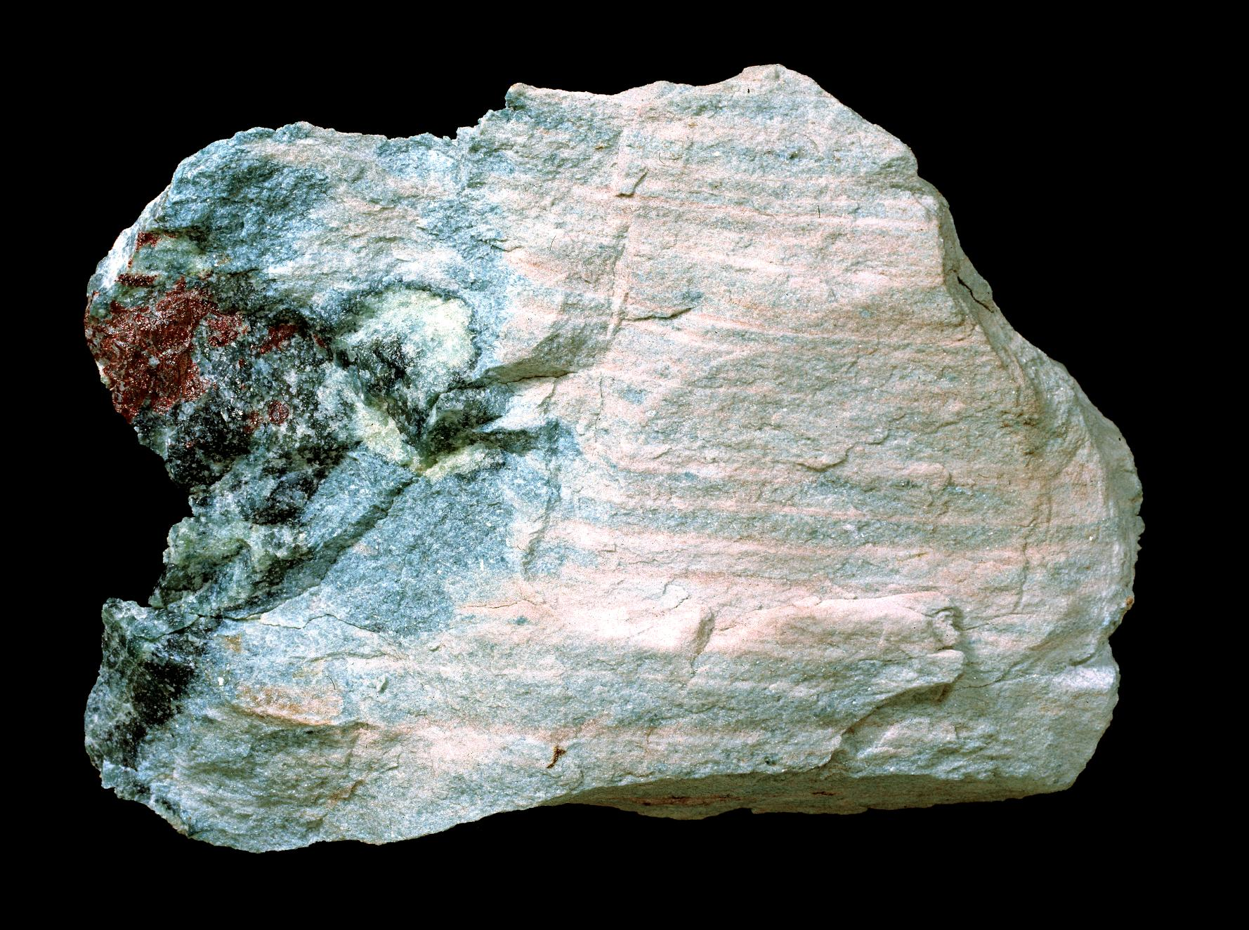 Värmlands landskapssten är kyanitkvartsiten. Den består i genomsnitt till 40 procent av det aluminiumrika mineralet kyanit och till 60 procent av vit kvarts. Bergarten tros ha bildats vid högtrycksomvandling av ömsom mjäliga sediment, ömsom växelskiktade ler- och kvartssediment för 1900 till 1500 miljoner år sedan. Kyanitkvartsiten är en unik homogent blå eller blå-vitrandig bergart vars vackra färg gjort den eftertraktad som byggsten. Kyanit bildas endast vid mycket höga tryck och måttlig temperatur och kvartsiten har flotationsanrikats på sin kyanit, vars smältpunkt är mycket hög. Kvartsiten är därför användbar till värmetåliga keramiska produkter.